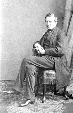 Cornelis van Foreest (1817-1875)